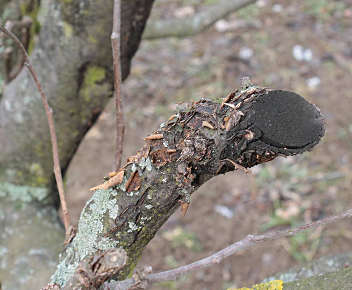 Nektriová rakovina je houbová choroba dřevin způsobená houbou hlívenka buková Nectria galligena (Neonectria galligena), Brno-Komín